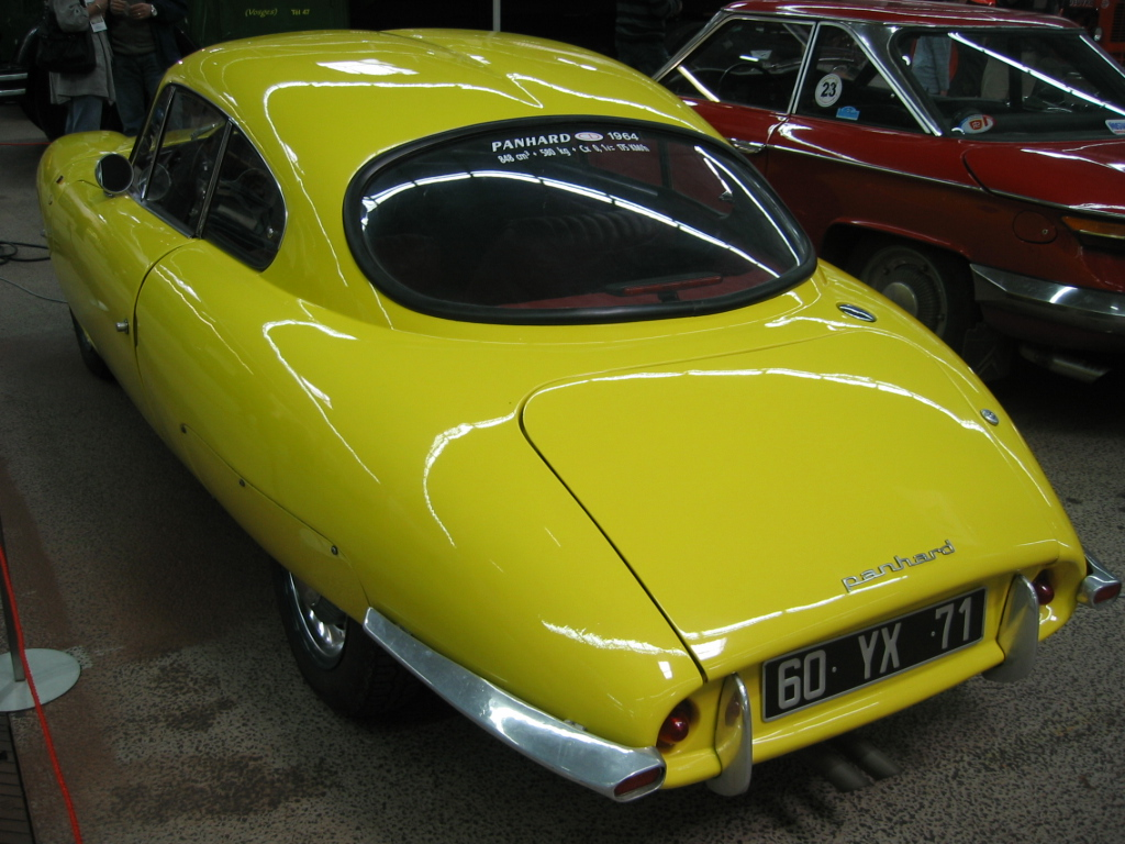 Panhard CD